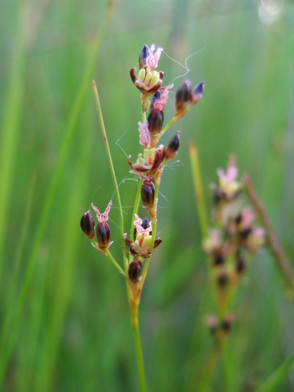 Bodden-Binse Juncus gerardii, Zingst